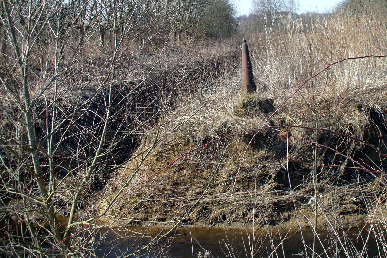 Dräilännereck zu Rodange